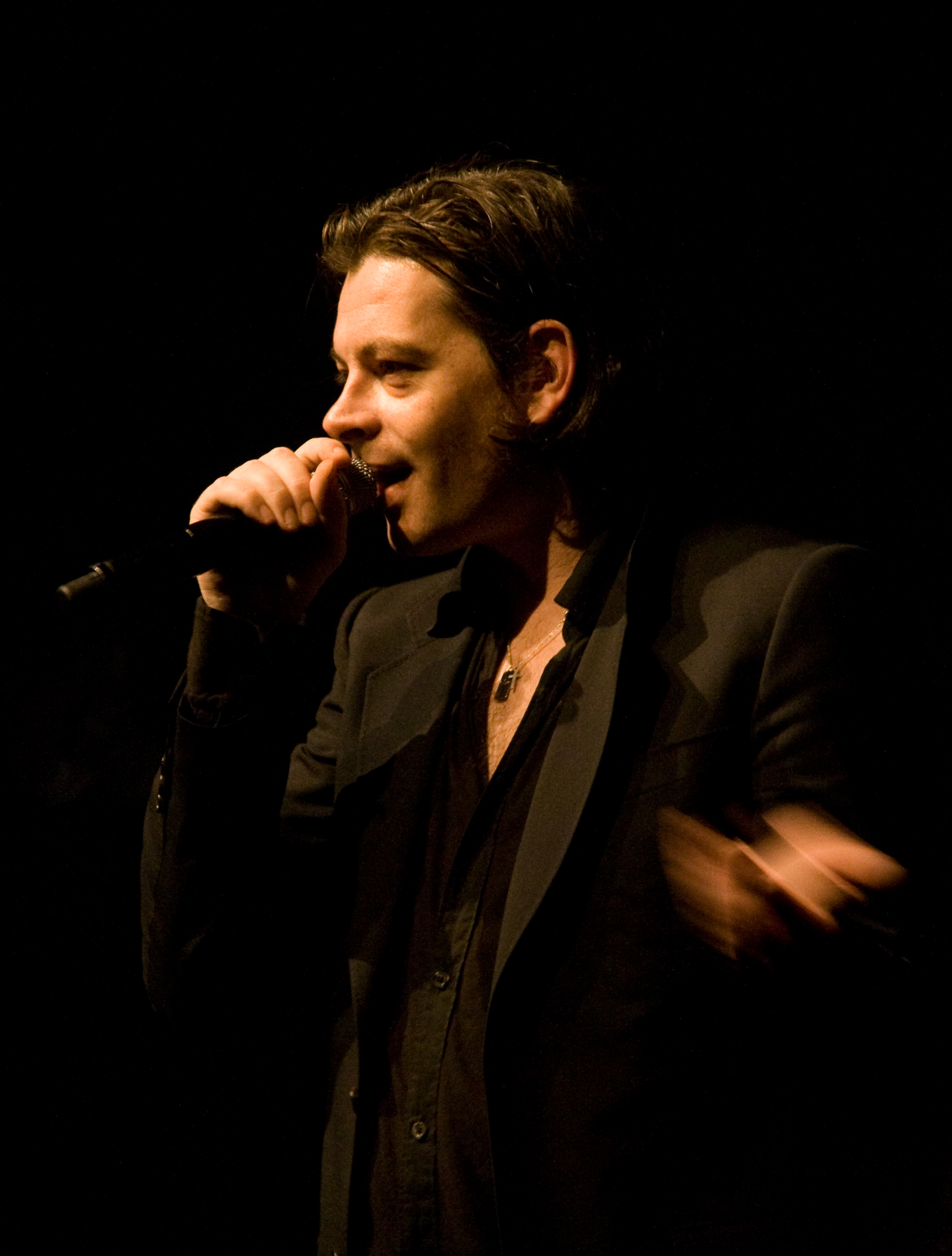 Photo de Benjamin Biolay live au casino de paris